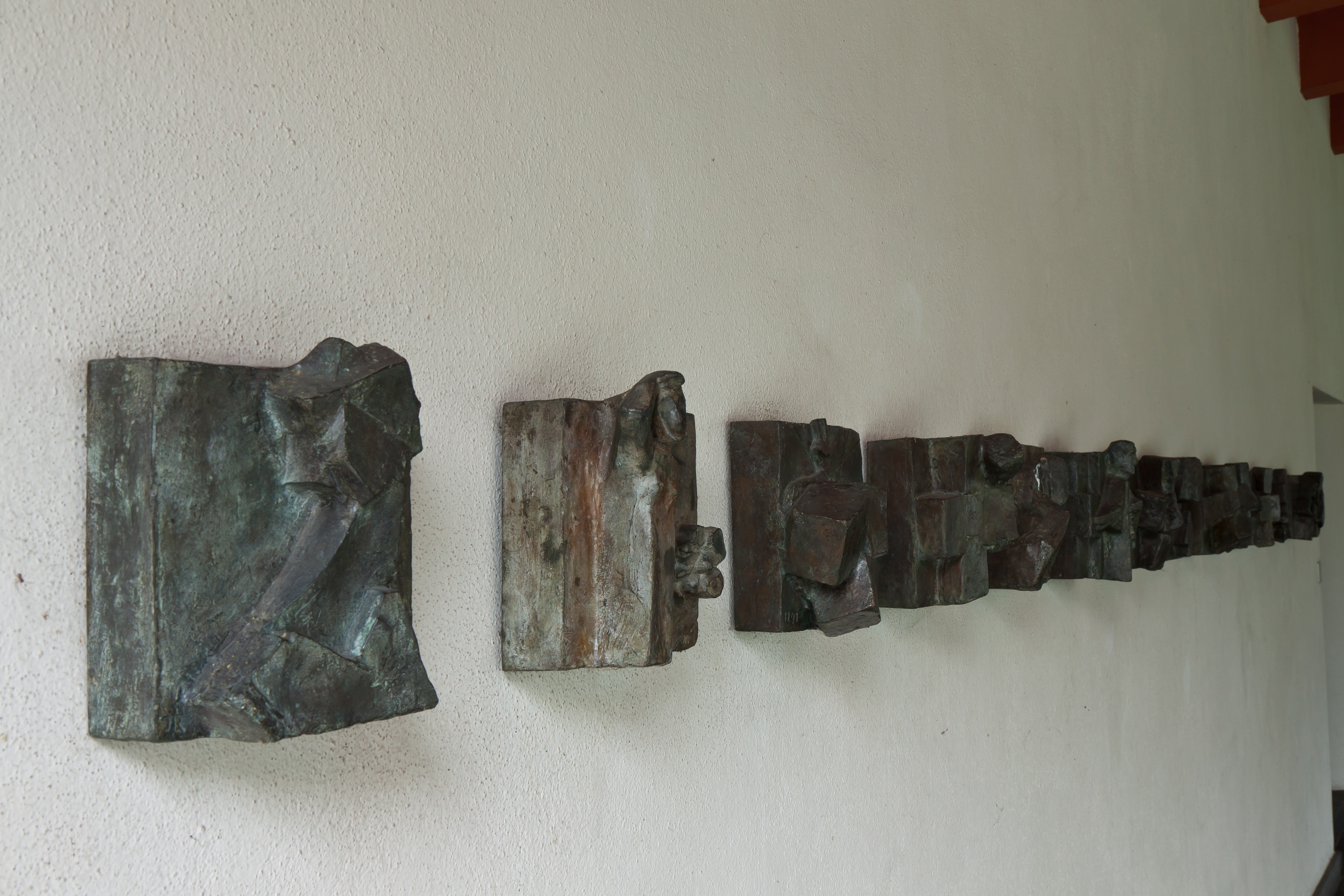 Eidgenössischer Kreuzweg, von Josef Rickenbacher, im Bundesbriefmuseum (bis 1991 Bundesbriefarchiv), Schwyz